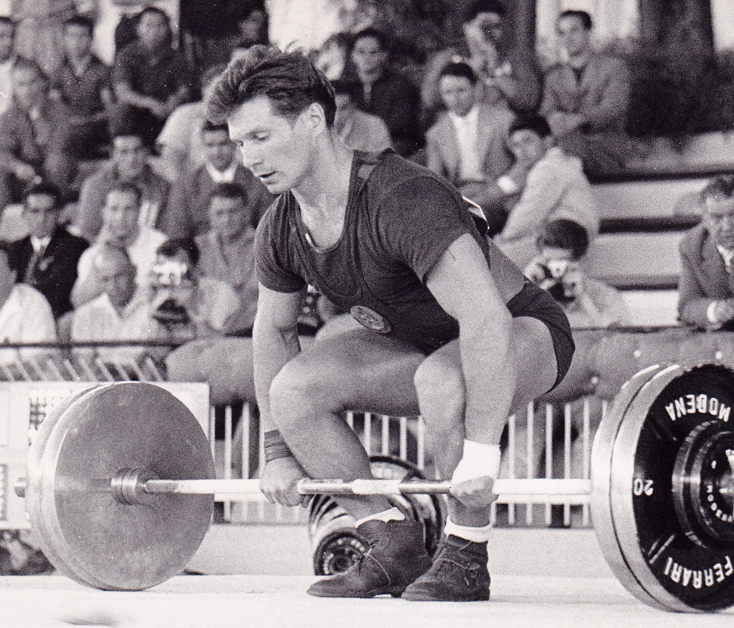 Viktor Bushuev